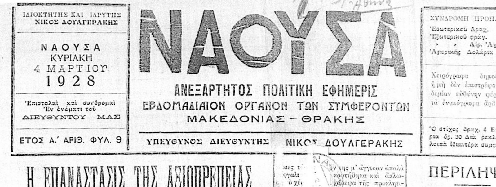 Главата на вестник "Науса".